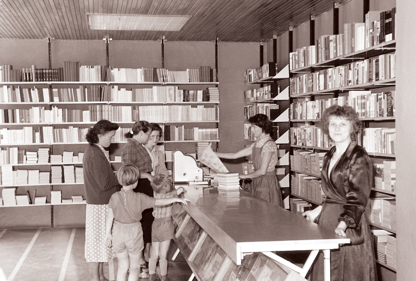 Knjigarna Mladinske knjige v Jurčičevi ulici